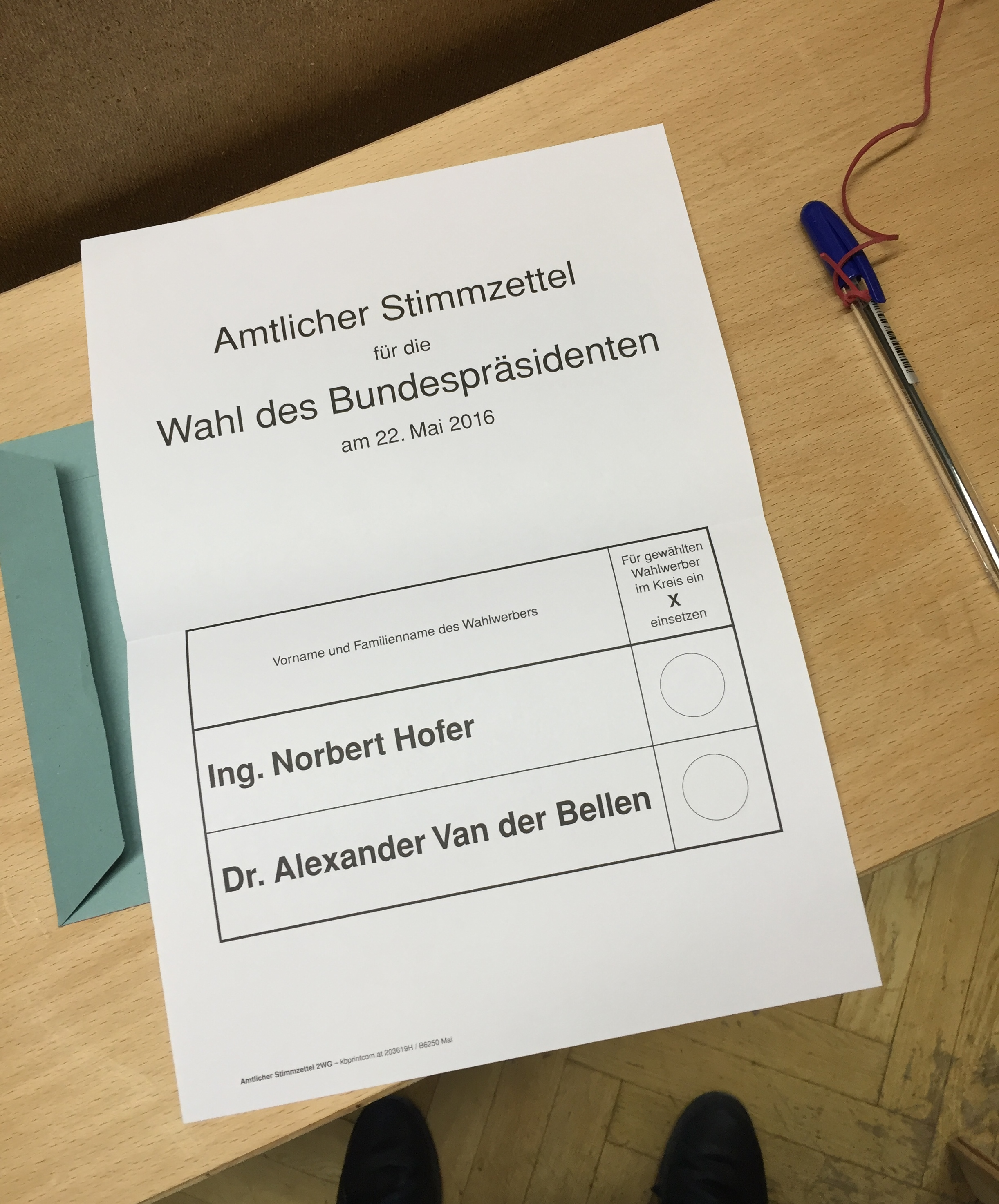 Amtlicher Stimmzettel Stichwahl Bundespräsidentenwahl 2016 in Österreich